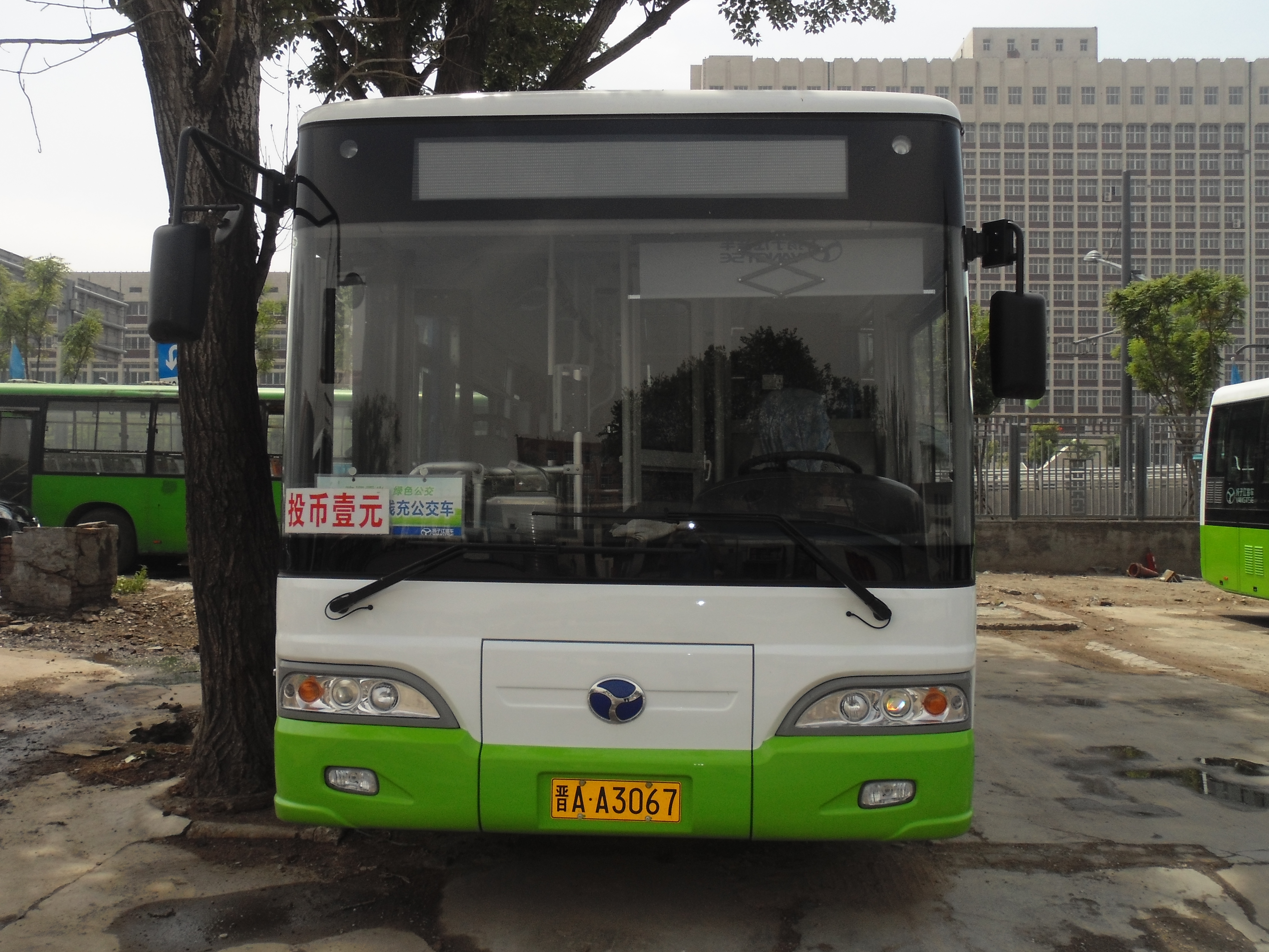 太原103路公交的武汉产WG6124BEVH。